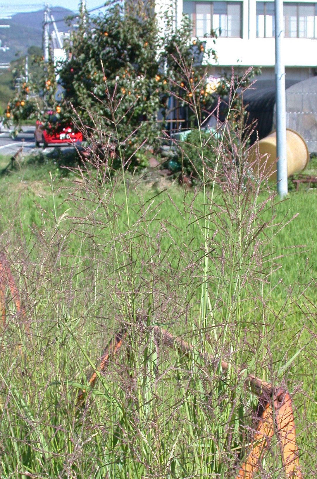 Arundinella hirta トダシバ（イネ科） 2007年11月3日 和歌山県田辺市